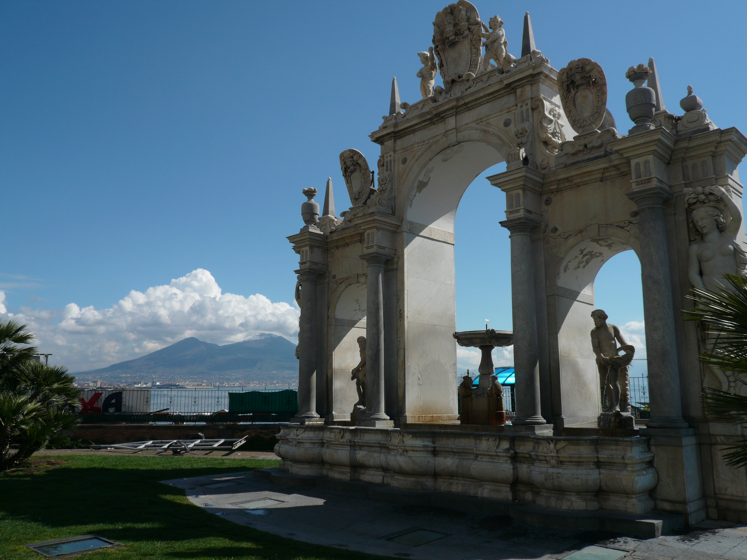 Fontana del Gigante di Napoli. Sullo sfondo il Vesuvio col cratere parzialmente innevato Autore foto: Roberto De Martino